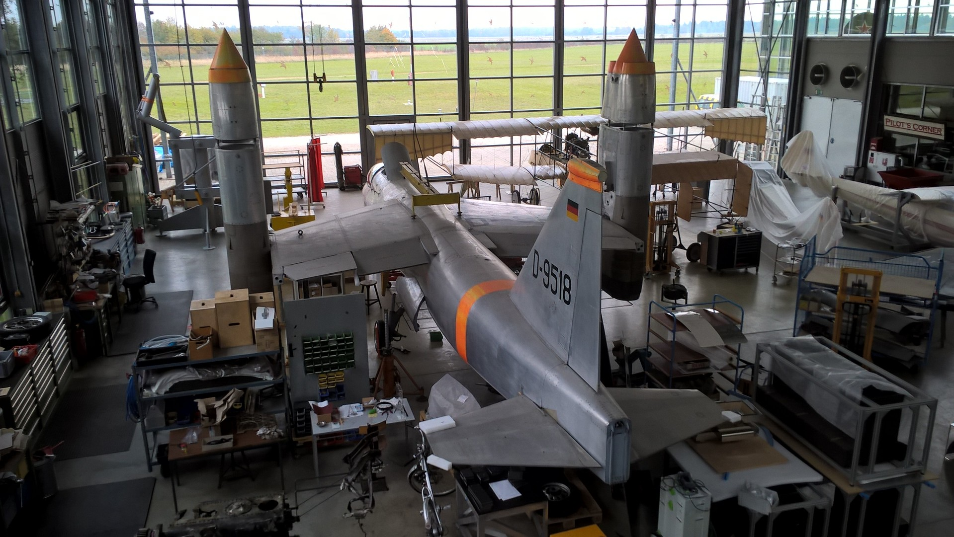 VJ101 in der Restaurationswerkstatt der Flugwerft Schleißheim während der Restauration des Deutschen Museums